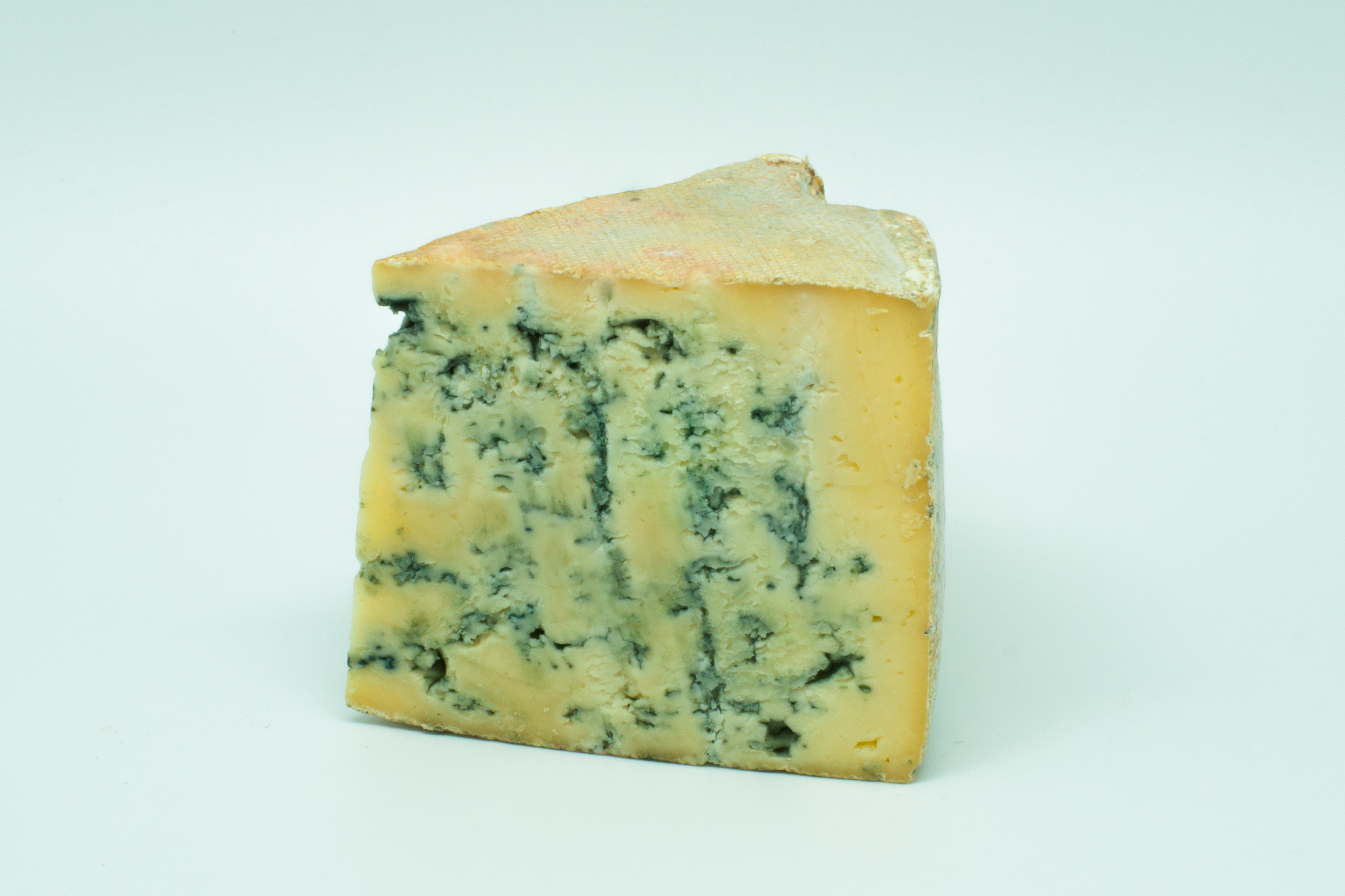 Bleuchâtel